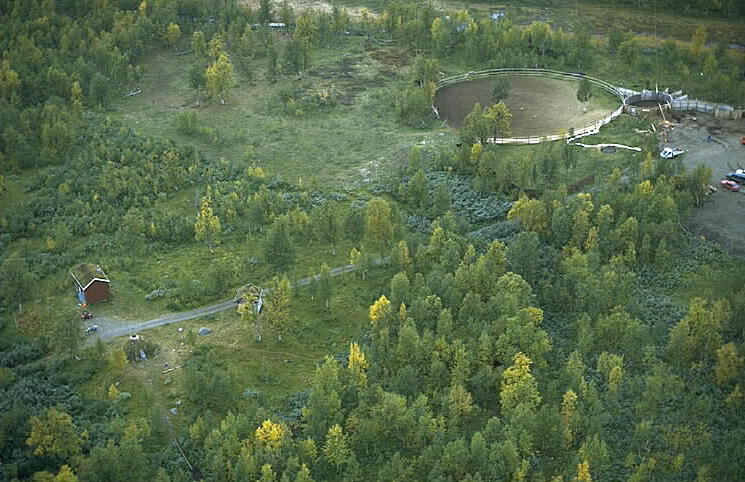 Motiv: Atostugan Nyckelord: Flygbilder, Riksintressen Kategori: Sameviste Atostugan